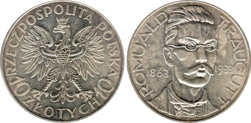 10 zlotych 1933 Romuald Traugutt